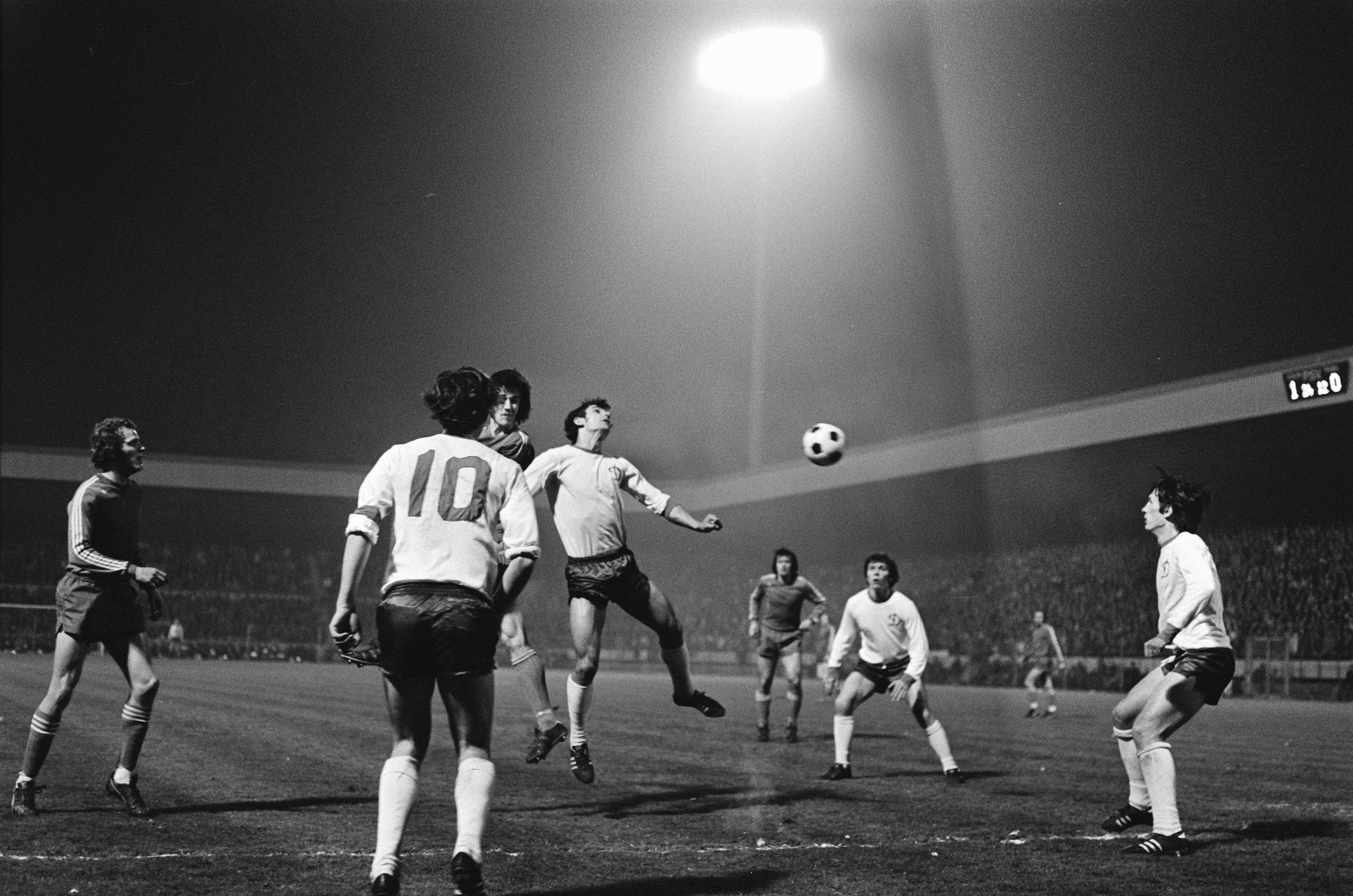 Collectie / Archief : Fotocollectie Anefo Reportage / Serie : [ onbekend ] Beschrijving : PSV tegen Dynamo Kiev 2-1, spelmomenten Datum : 23 april 1975 Trefwoorden : sport, voetbal Persoonsnaam : Dynamo Kiev Instellingsnaam : PSV Fotograaf : Mieremet, Rob / Anefo Auteursrechthebbende : Nationaal Archief Materiaalsoort : Negatief (zwart/wit) Nummer archiefinventaris : bekijk toegang 2.24.01.05 Bestanddeelnummer : 927-8885